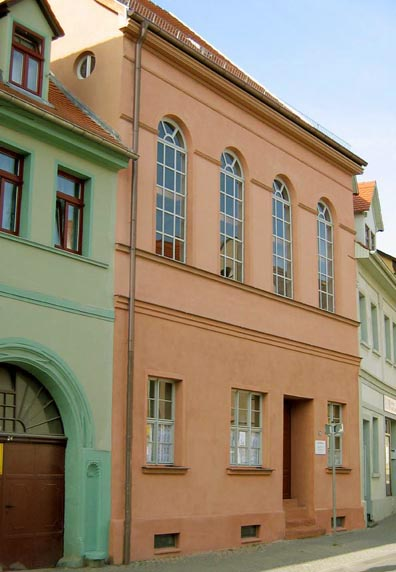 Synagoge zu Eisleben, Strassenseitige Fassade